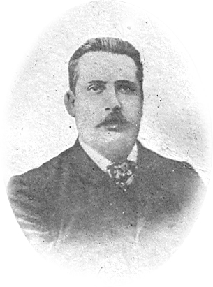 José Estêvão Brosselard Pais de VASCONCELOS